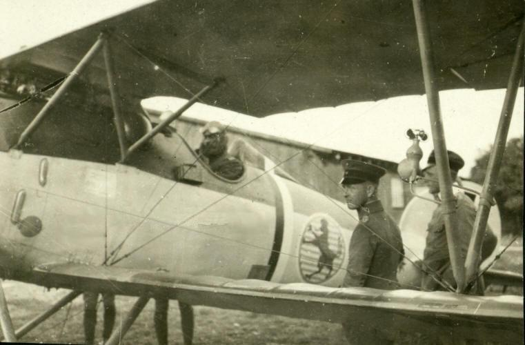 Die neue Fliegerabteilung (A) 272 Oblt. Eduard Schleich, Führer der Jagdstaffel 21 kommt zu Besuch. Flugzeug Typ Albatros D V